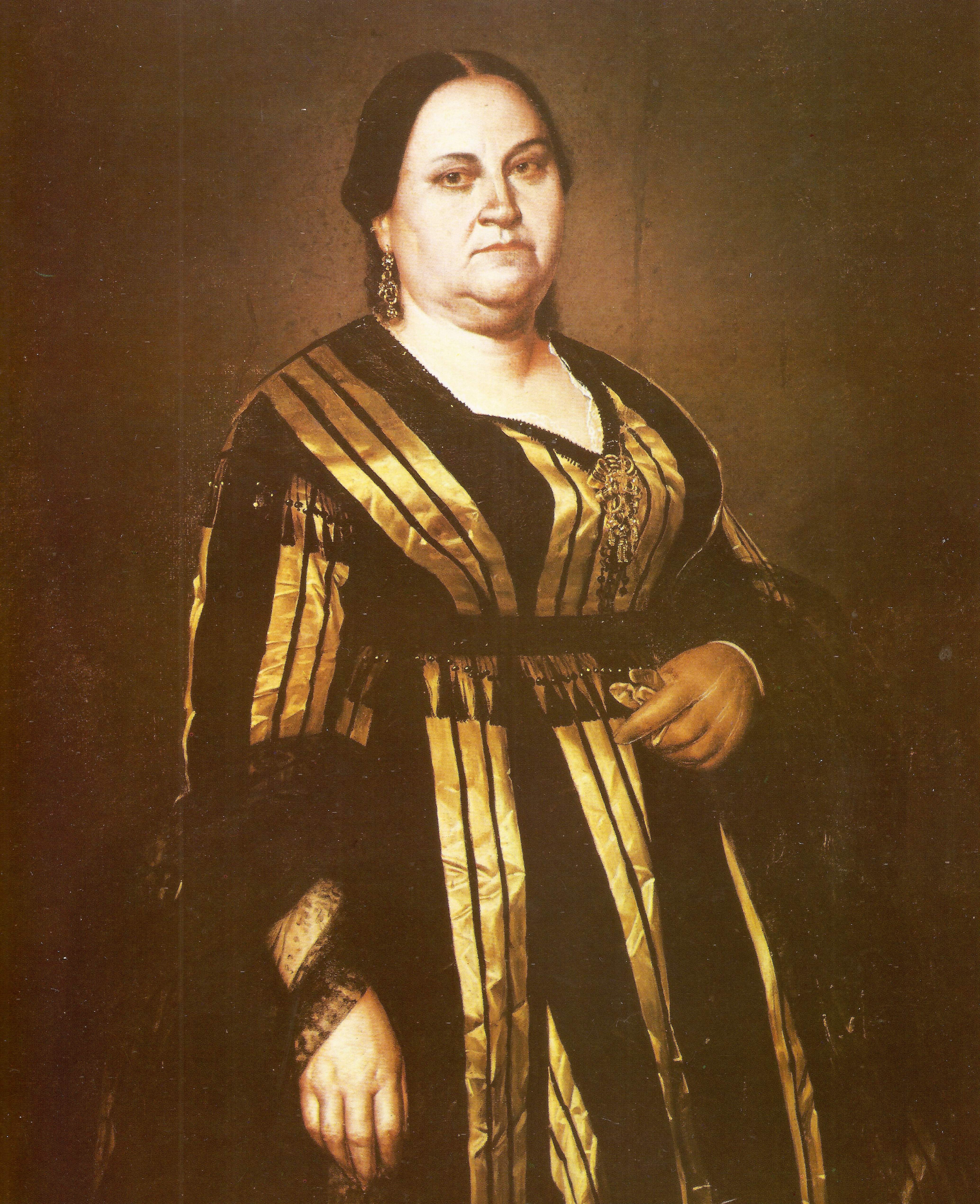 Retrato de Carlota Blanco de Guzman. Oleo sobre tela 160 x 82 cm Colección de la Galería de Arte Nacional. Caracas - Venezuela.